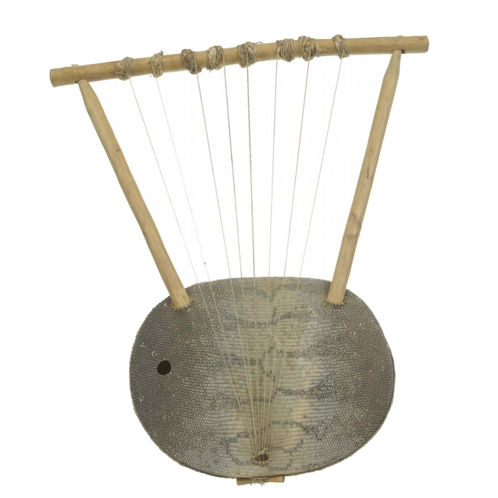 De lier, ook wel endongo genaamd, wordt in Afrika voornamelijk gebruikt om het zingen tijdens religieuze festiviteiten en magische riten te begeleiden. De snaren worden getokkeld met de vingers.